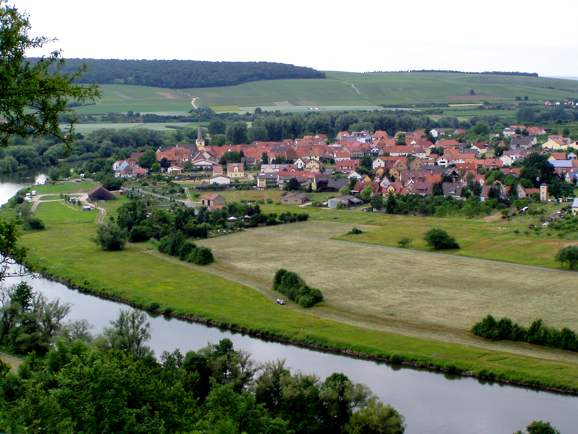 Fahr, ein Ortsteil von Volkach, gesehen von der Vogelsburg.